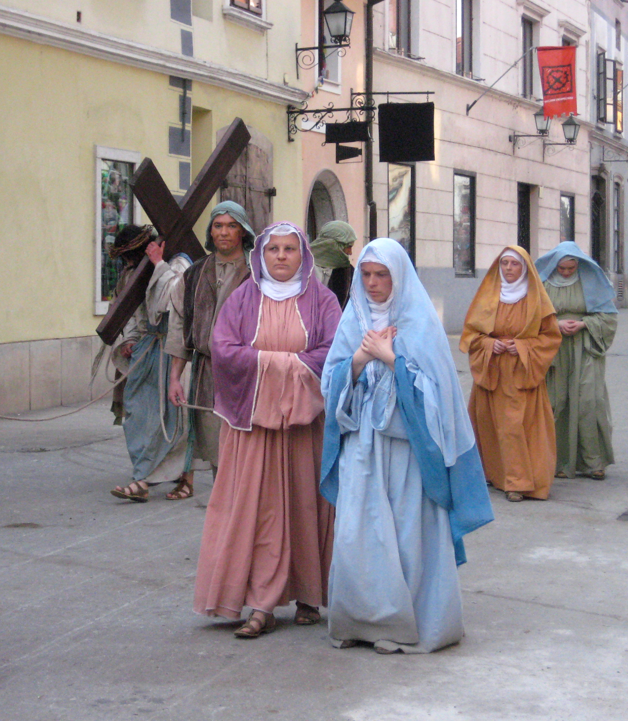 Škofjeloški pasijon (Processio Locopolitana), izvedba 2009 v Škofji Loki